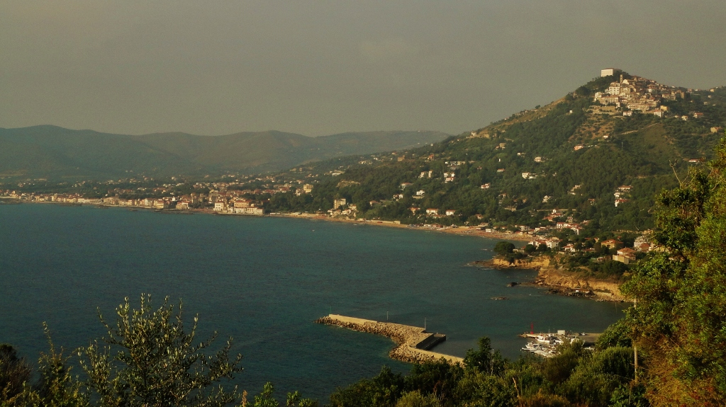 Vista panoramica del comune di Castellabate, con il borgo medievale in cima al colle, il porto di San Marco, la marina di Santa Maria e la spiaggia del Pozzillo